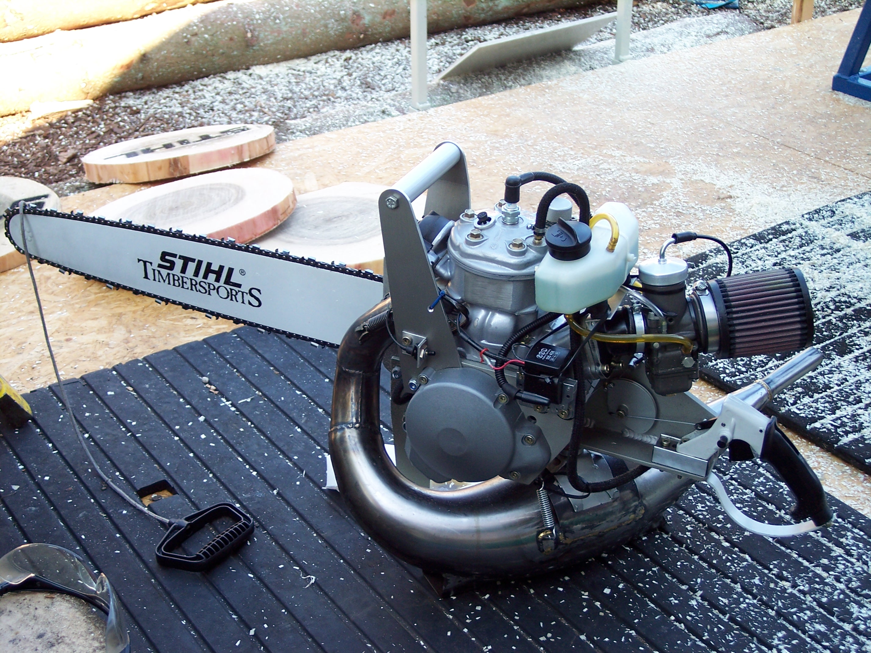 HotSaw STIHL Timbersports